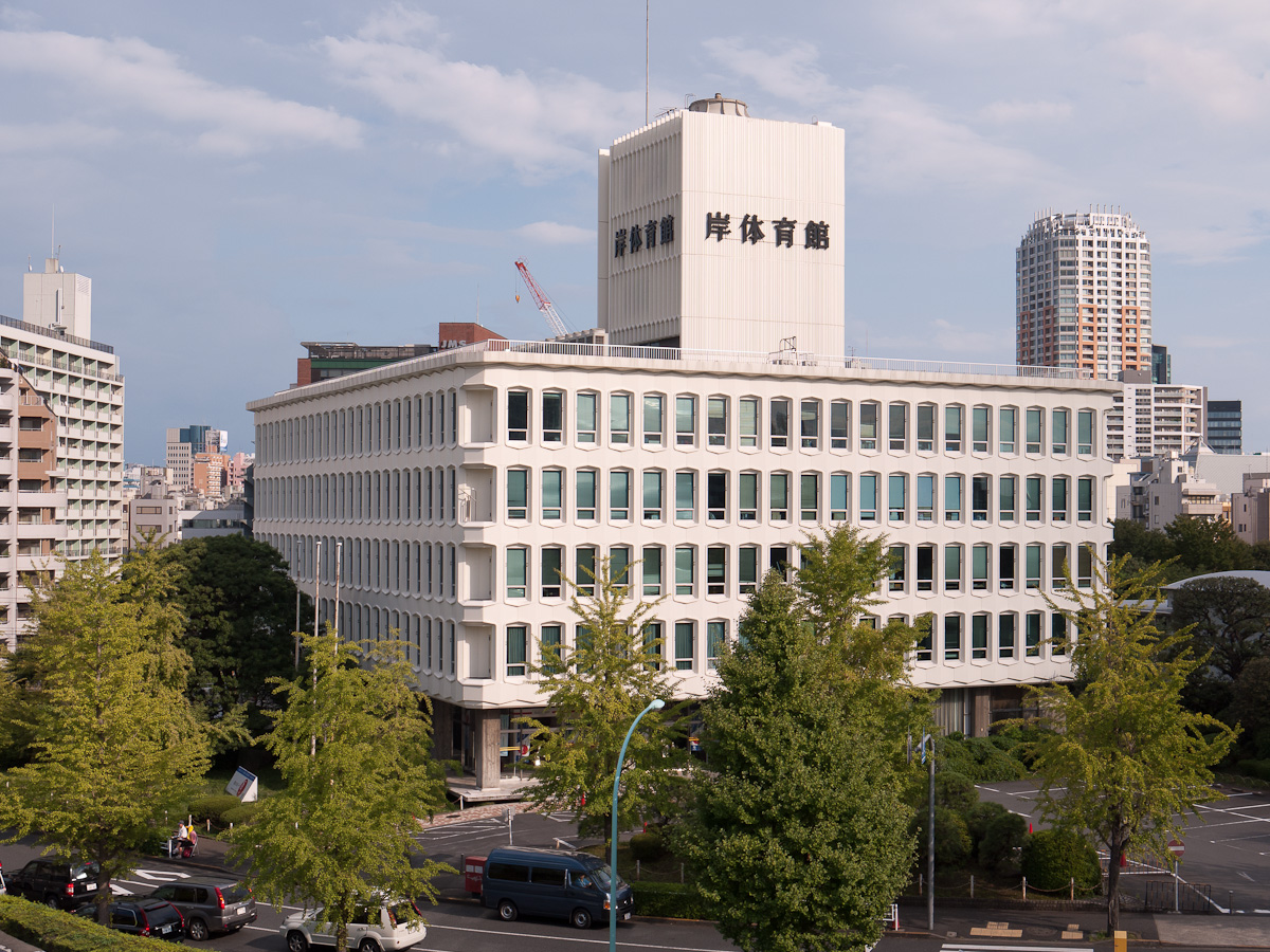 岸記念体育会館、東京都渋谷区神南1丁目。